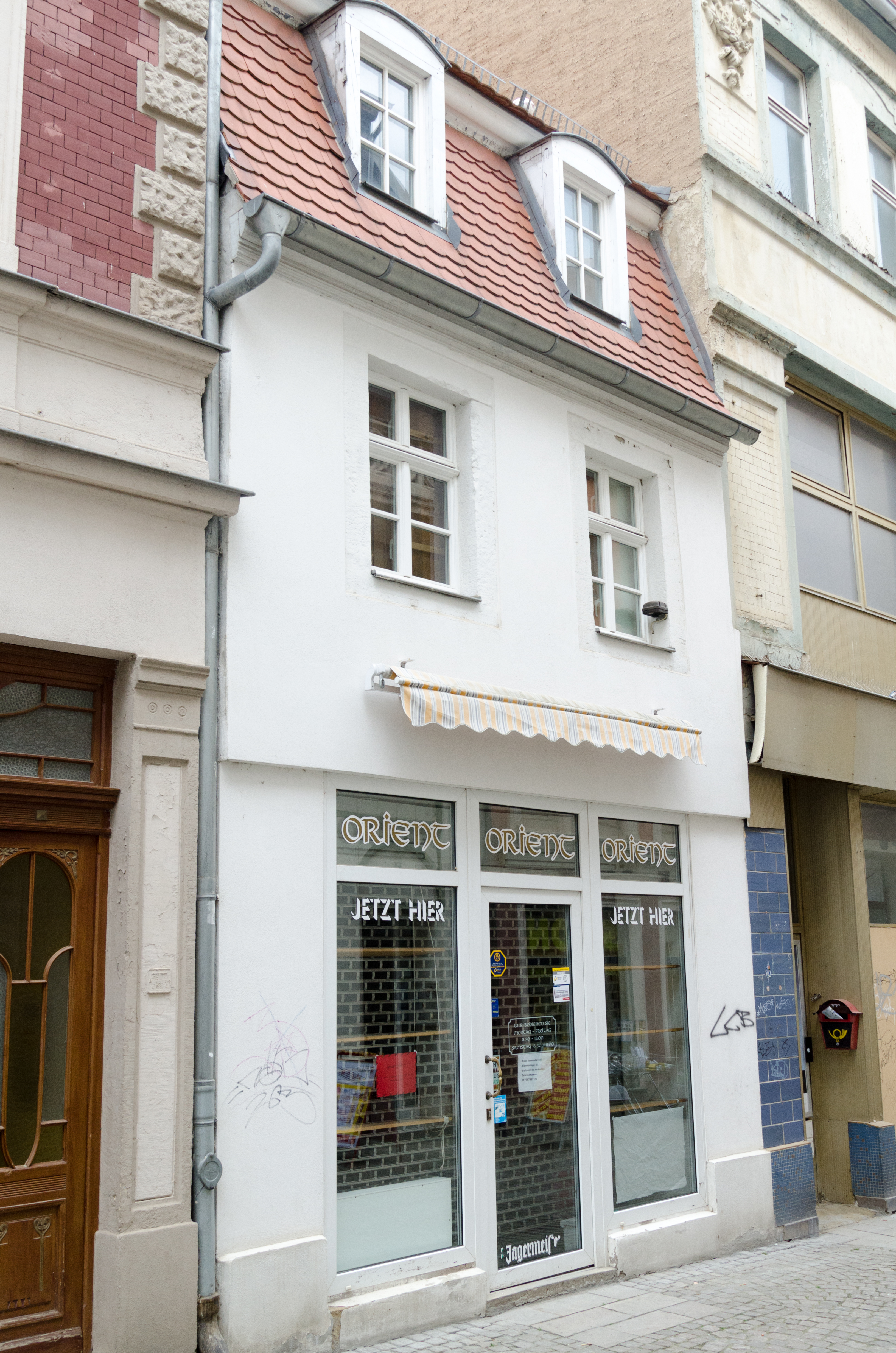 Zeitz, Kramerstraße 21